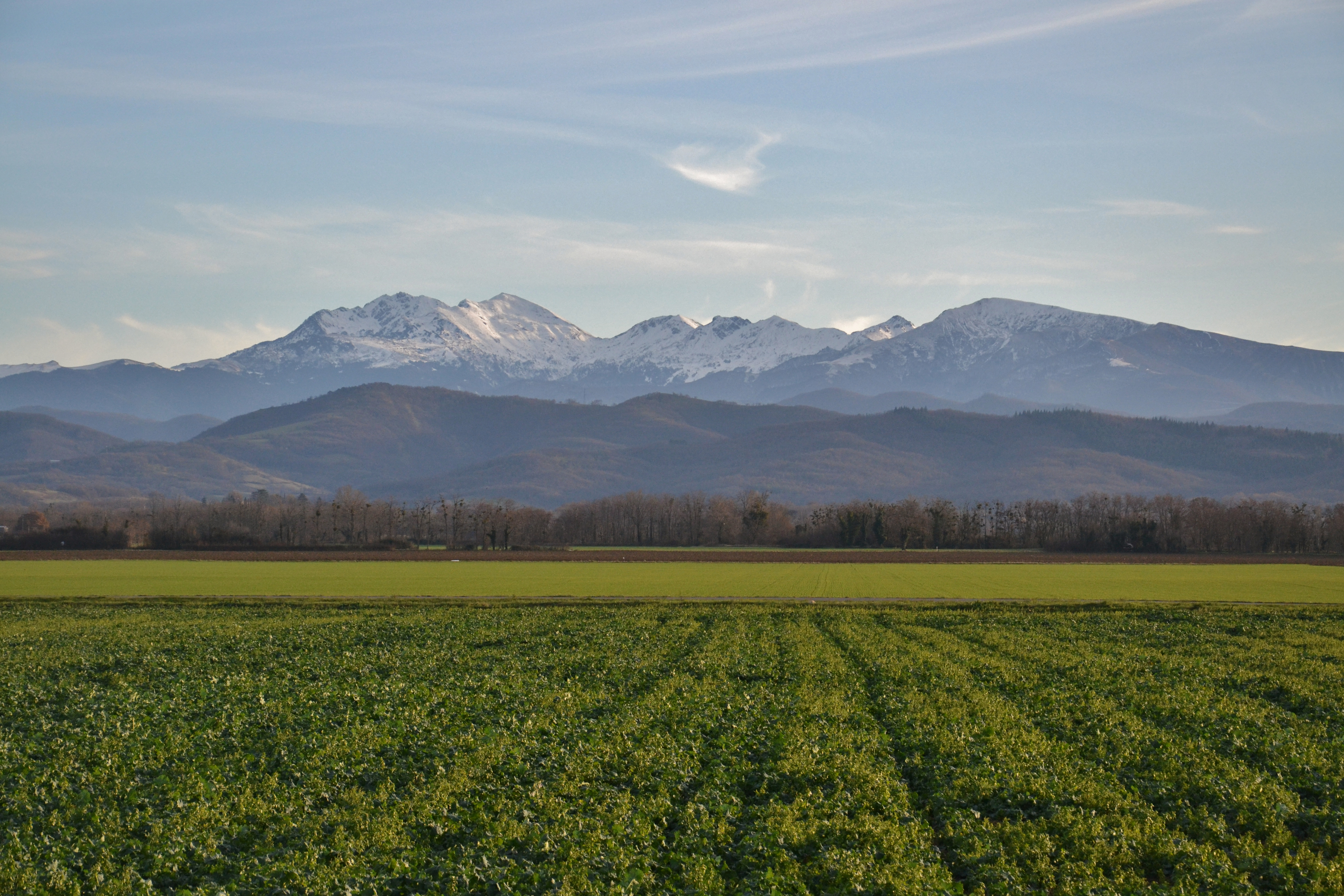 Vue du massif du Saint-Barthélémy (Tabe), dans les Pyrénées ariégeoises (France).